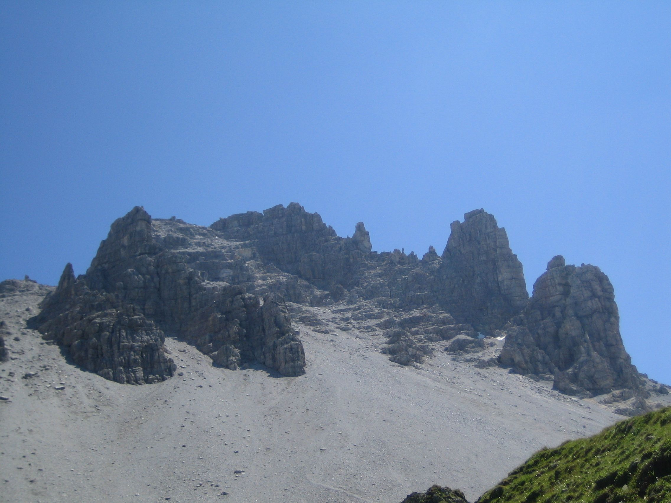 Schlicker Seespitze von Norden